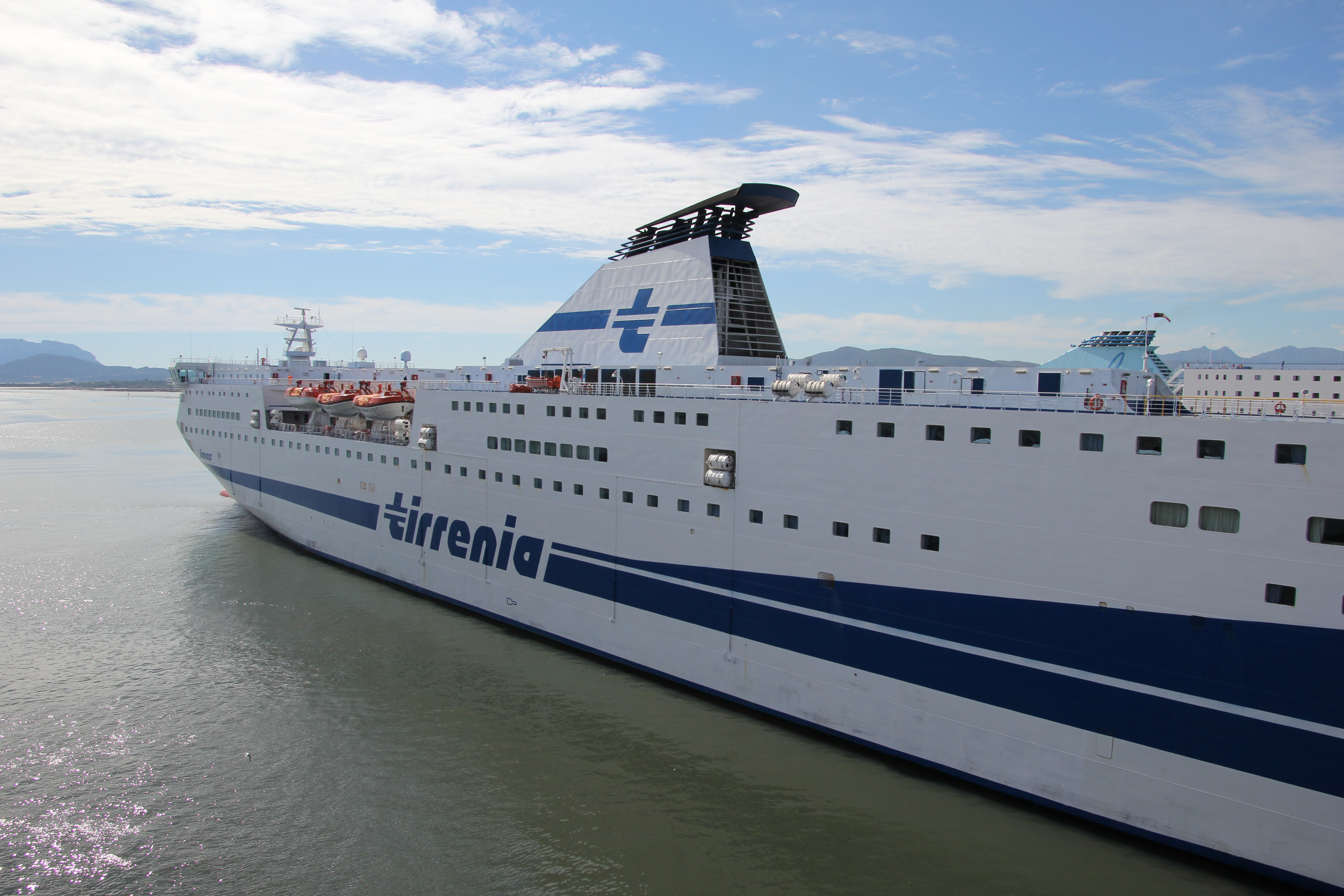 Tirrenia, nave Janas